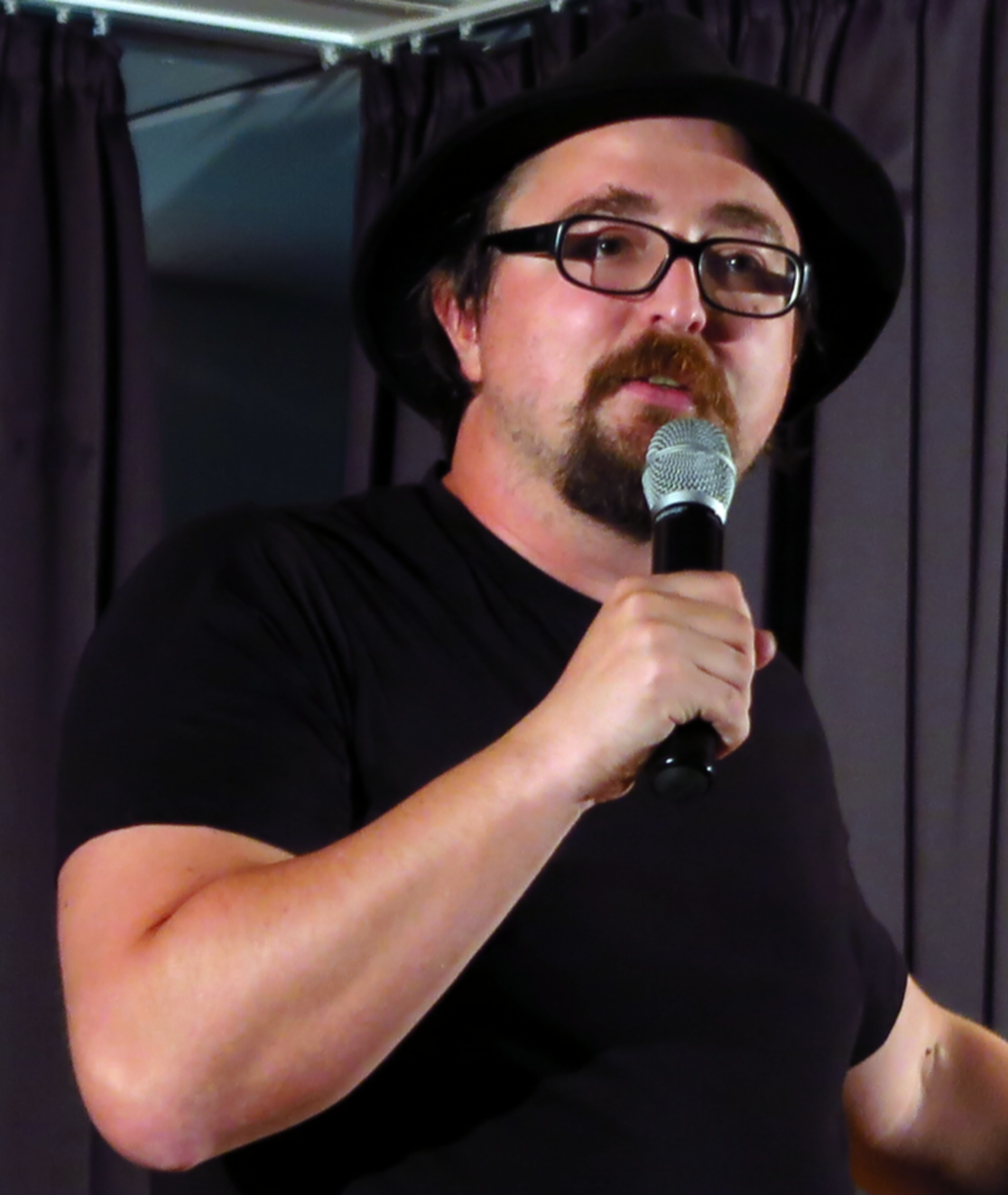 deutscher, bayerischer, oberpfälzer Musikkabarettist, im Frühjahr 2015 mit seinem Programm "Heile Welt" in Gilching